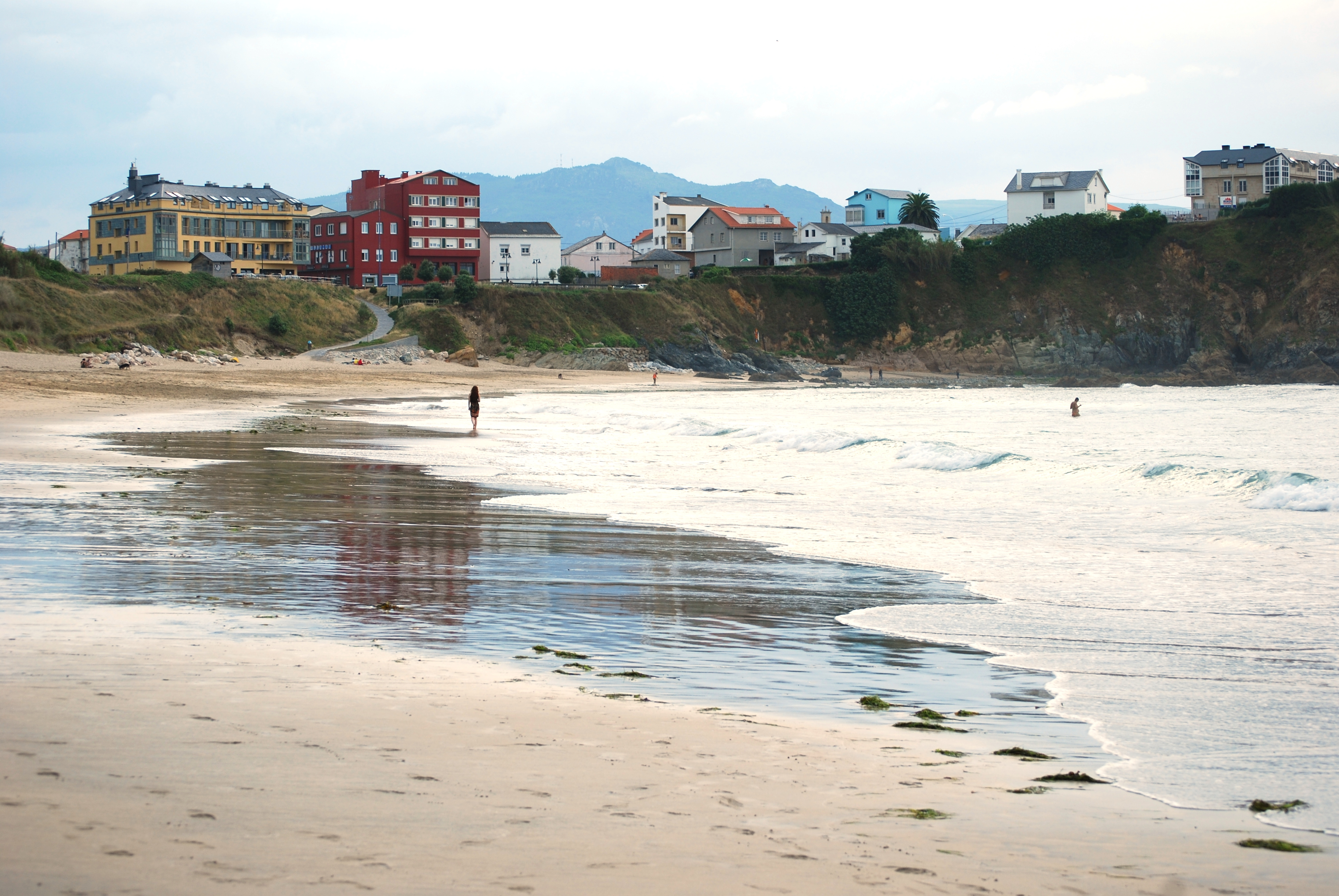 Praia de San Antón-Espasante Xullo 08.